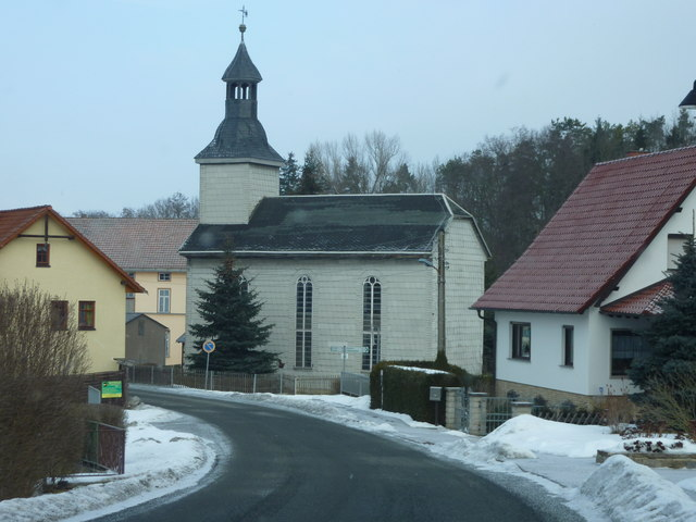 Thüringen. Kirche in Roda.